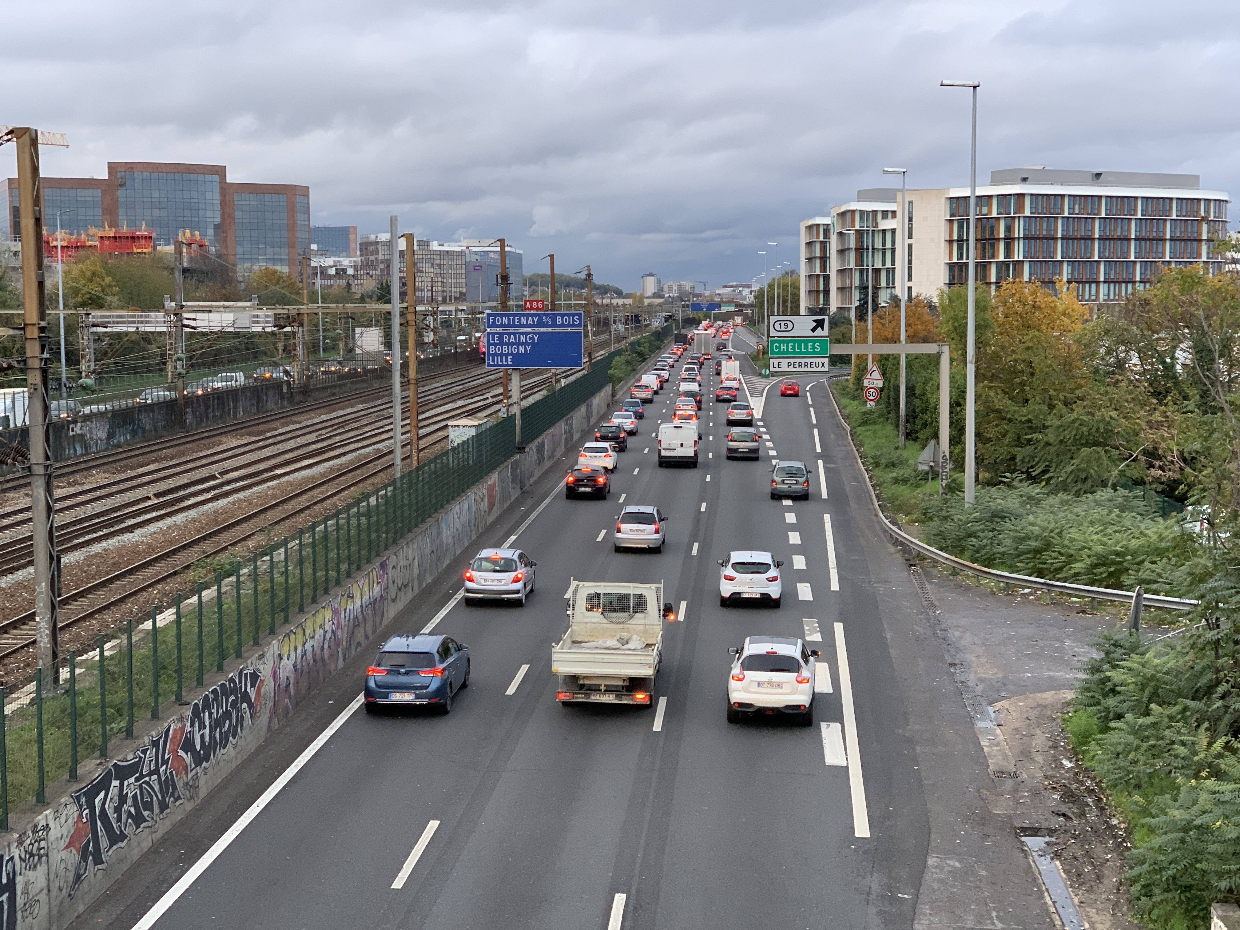 Autoroute A86 en direction de Rosny-sous-Bois à Fontenay-sous-Bois vue depuis le pont de l'avenue de Neuilly.